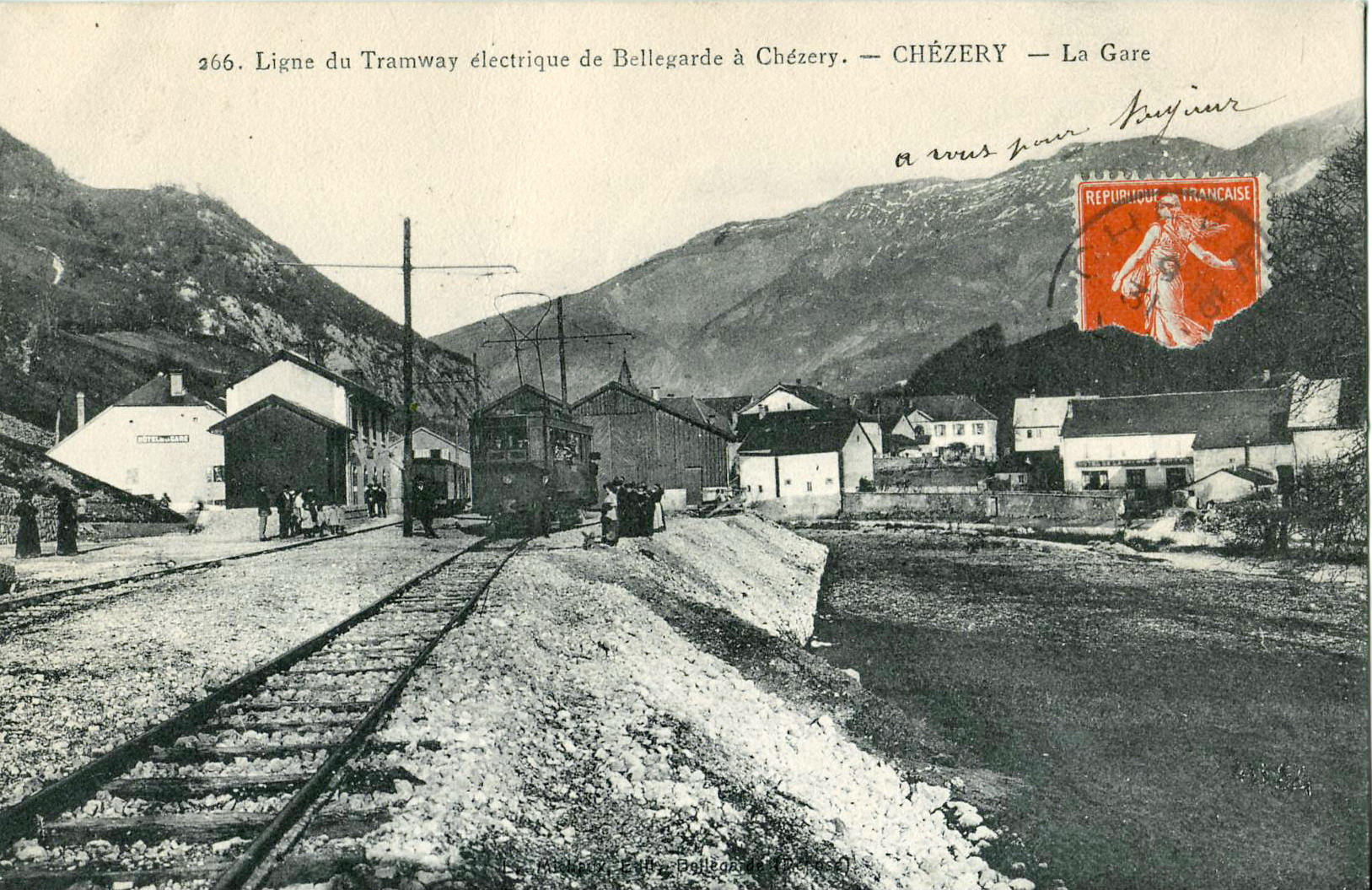 Carte postale ancienne éditée par :Ligne du Tramway électrique électrique de Bellegarde à Chézery - CHEZERY